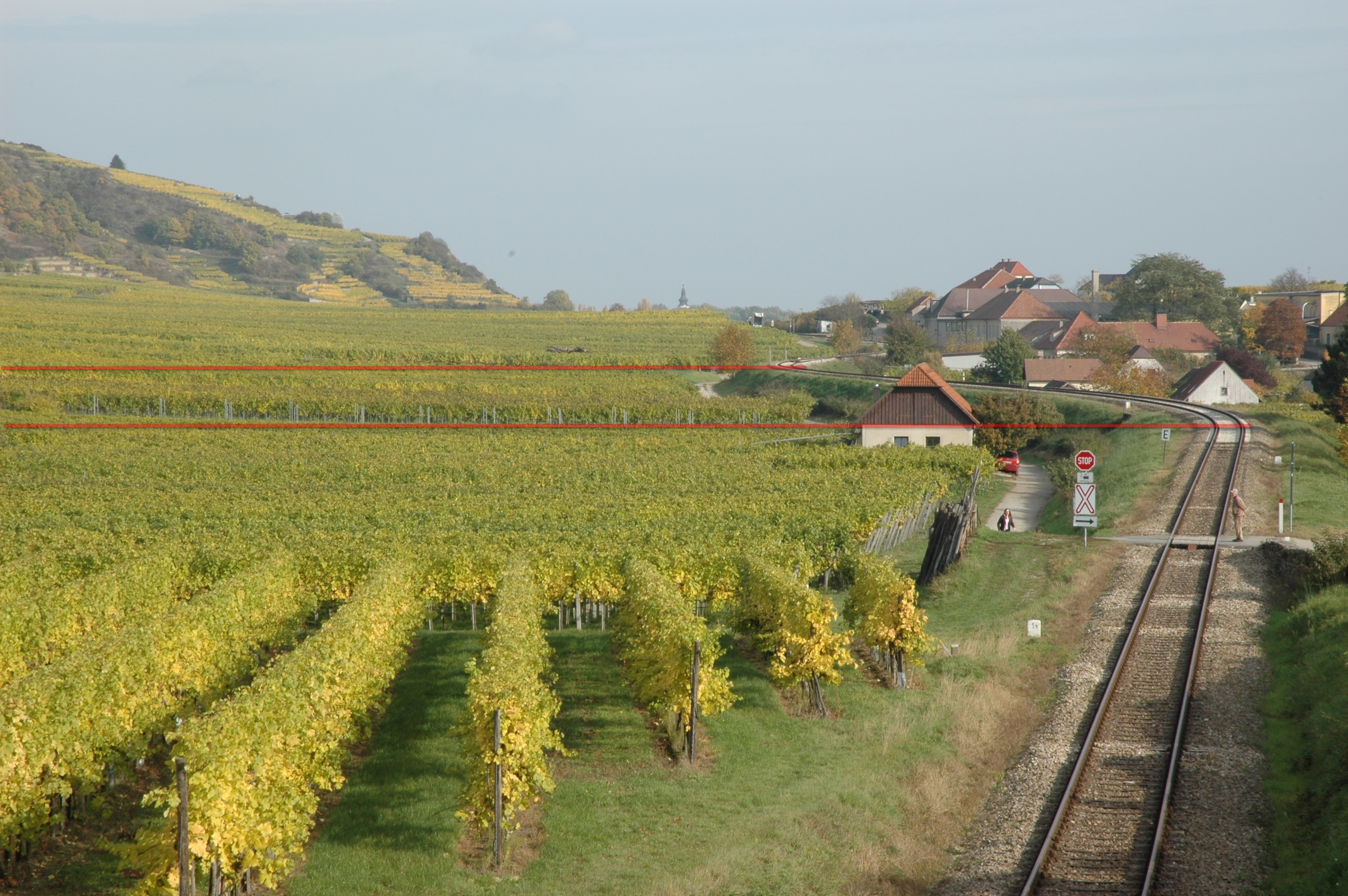 Kaltluftseebildung durch Bahndamm